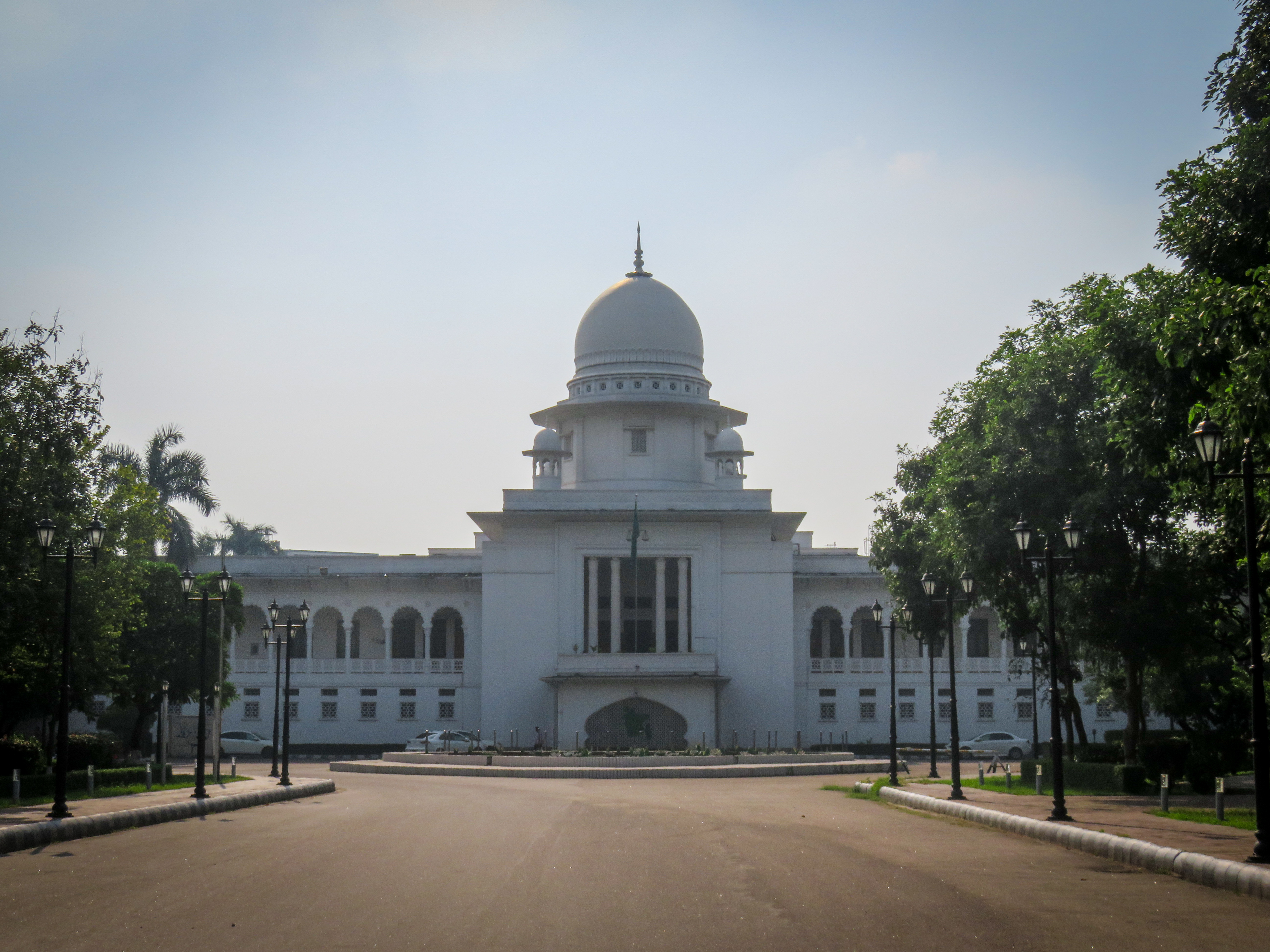 বাংলাদেশ সুপ্রীম কোর্ট